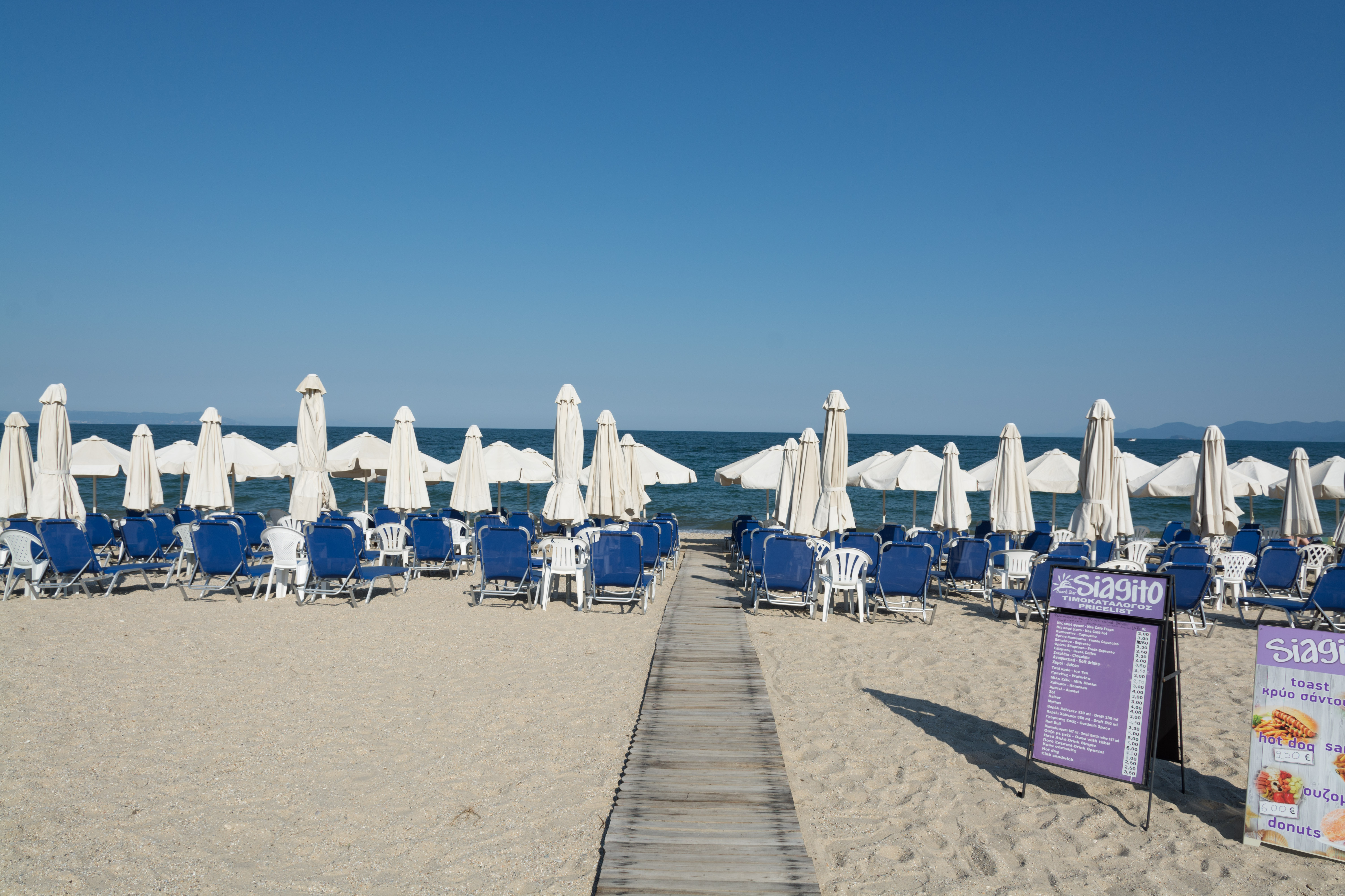 Ασπροβάλτα